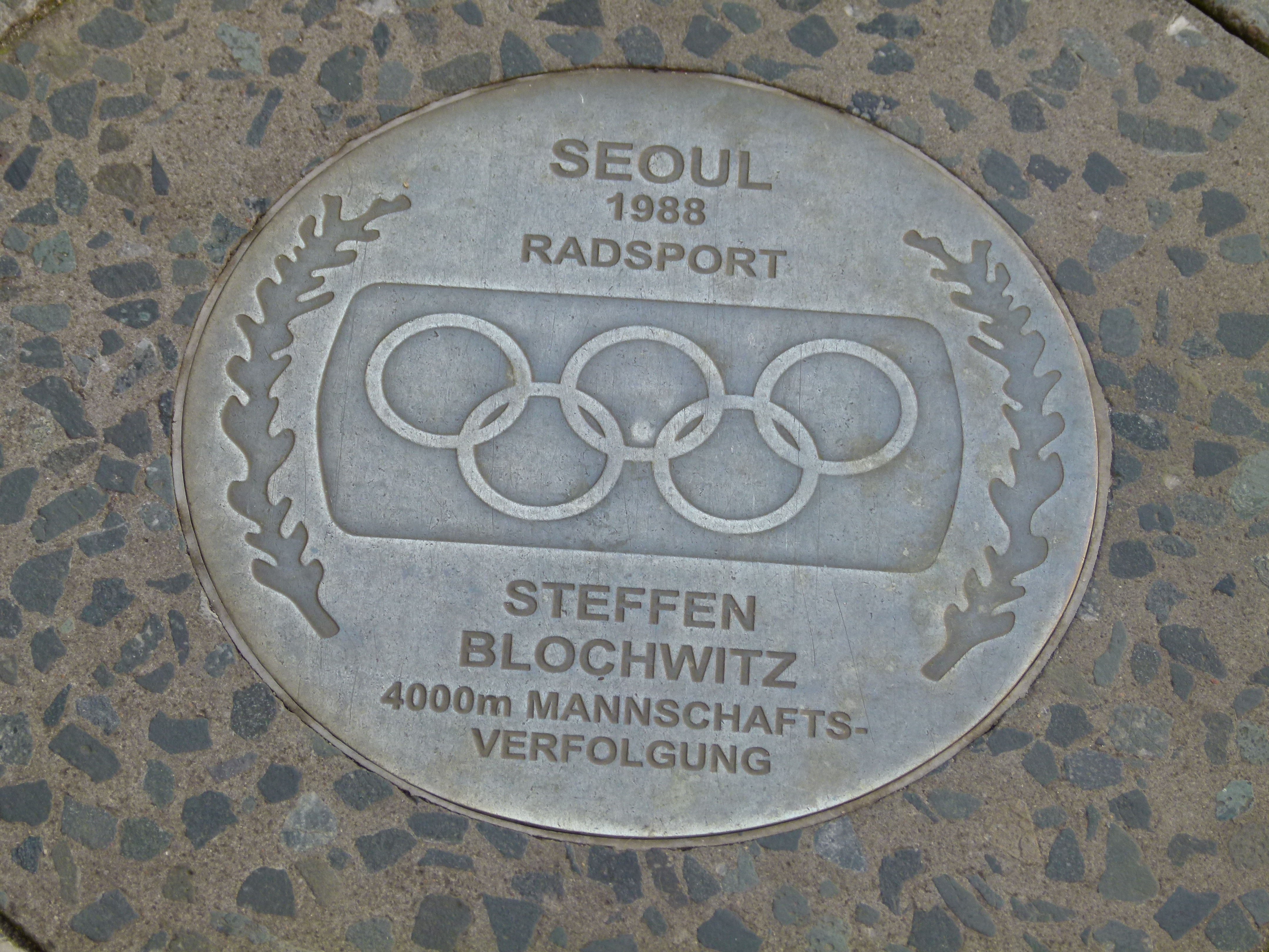 Steffen Blochwitz, Radsport, Seoul 1988